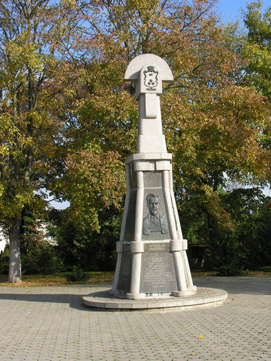 Paminklas broliams Biržiškoms ir jų tėvams atminti Viekšniuose, Mažeikių raj. Foto: Algirdas, 2005 m. spalio 20 d.